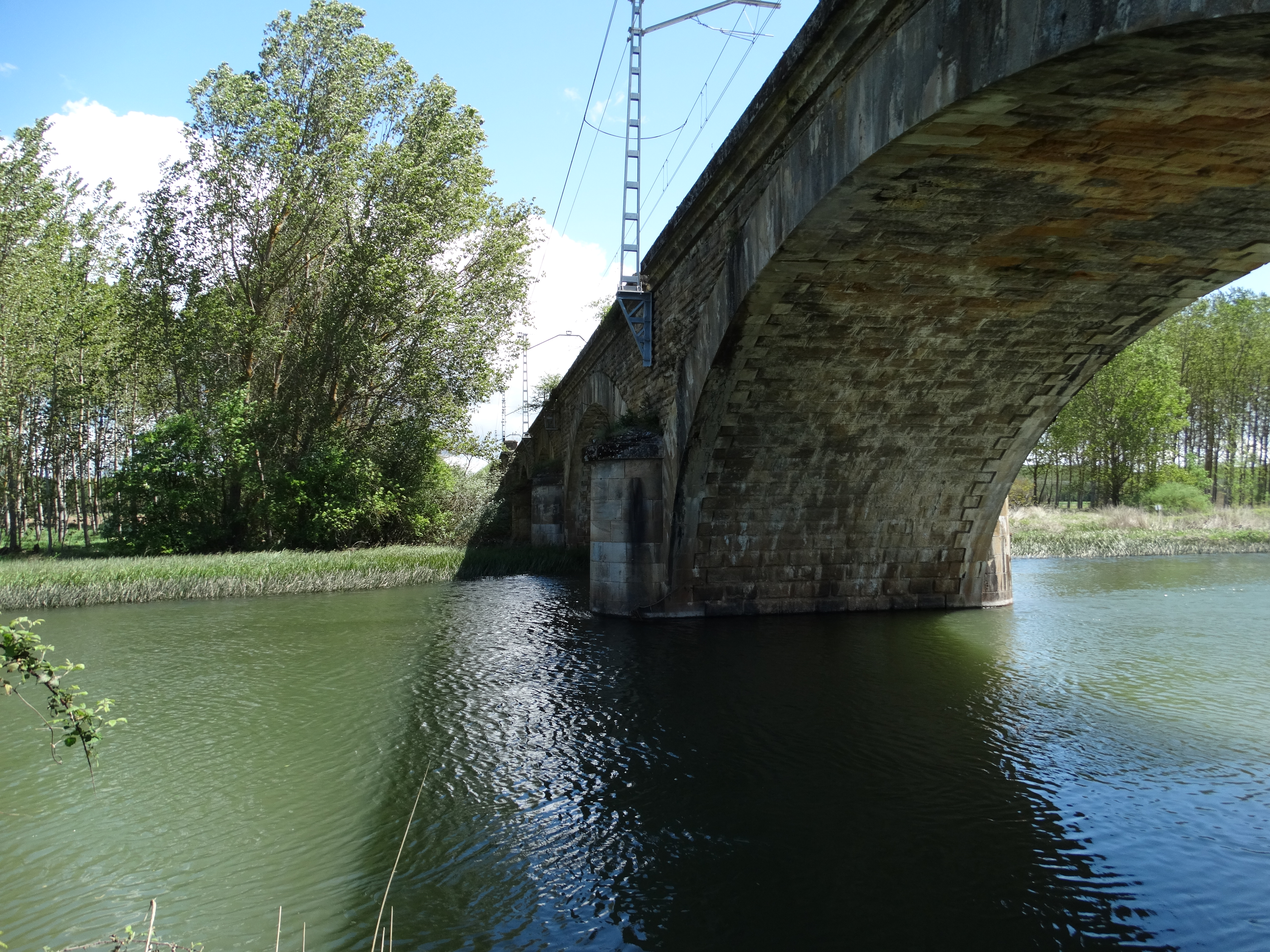 Puente de Los Dolores